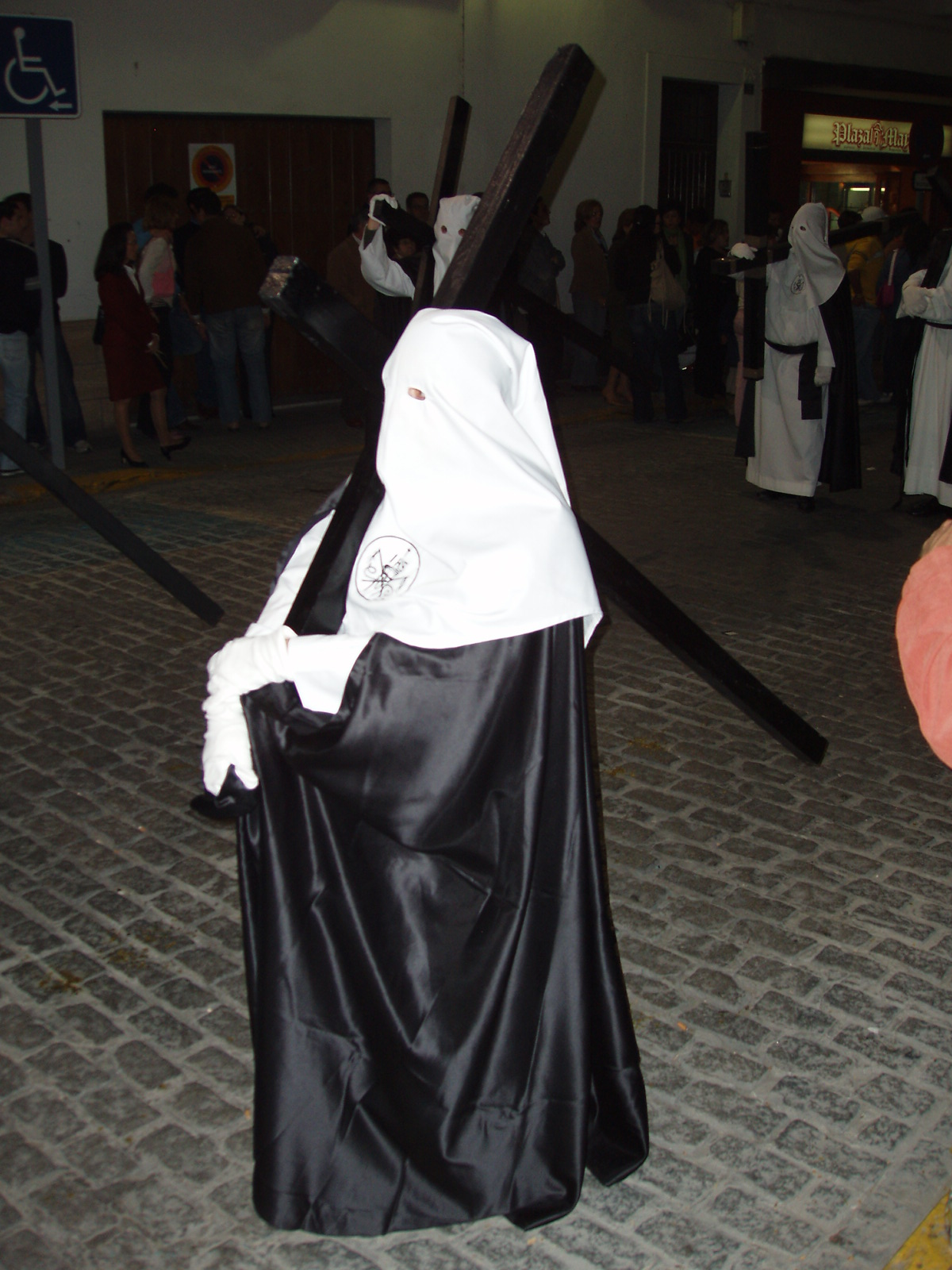 Nazareno de La Amargura. Domingo de Ramos. Semana Santa en El Puerto de Santa María, Cádiz, España.